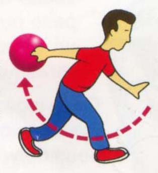 Tercer paso.